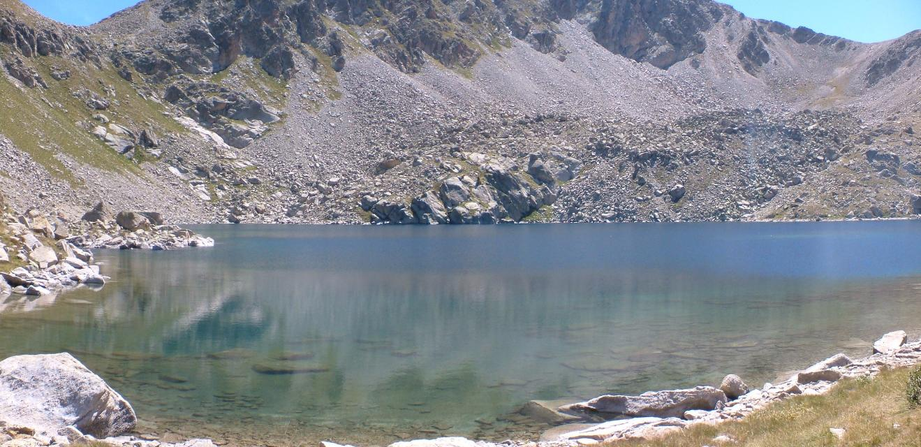 Estany Major de Morrano; la Vall de Boí, Alta Ribagorça, Catalunya